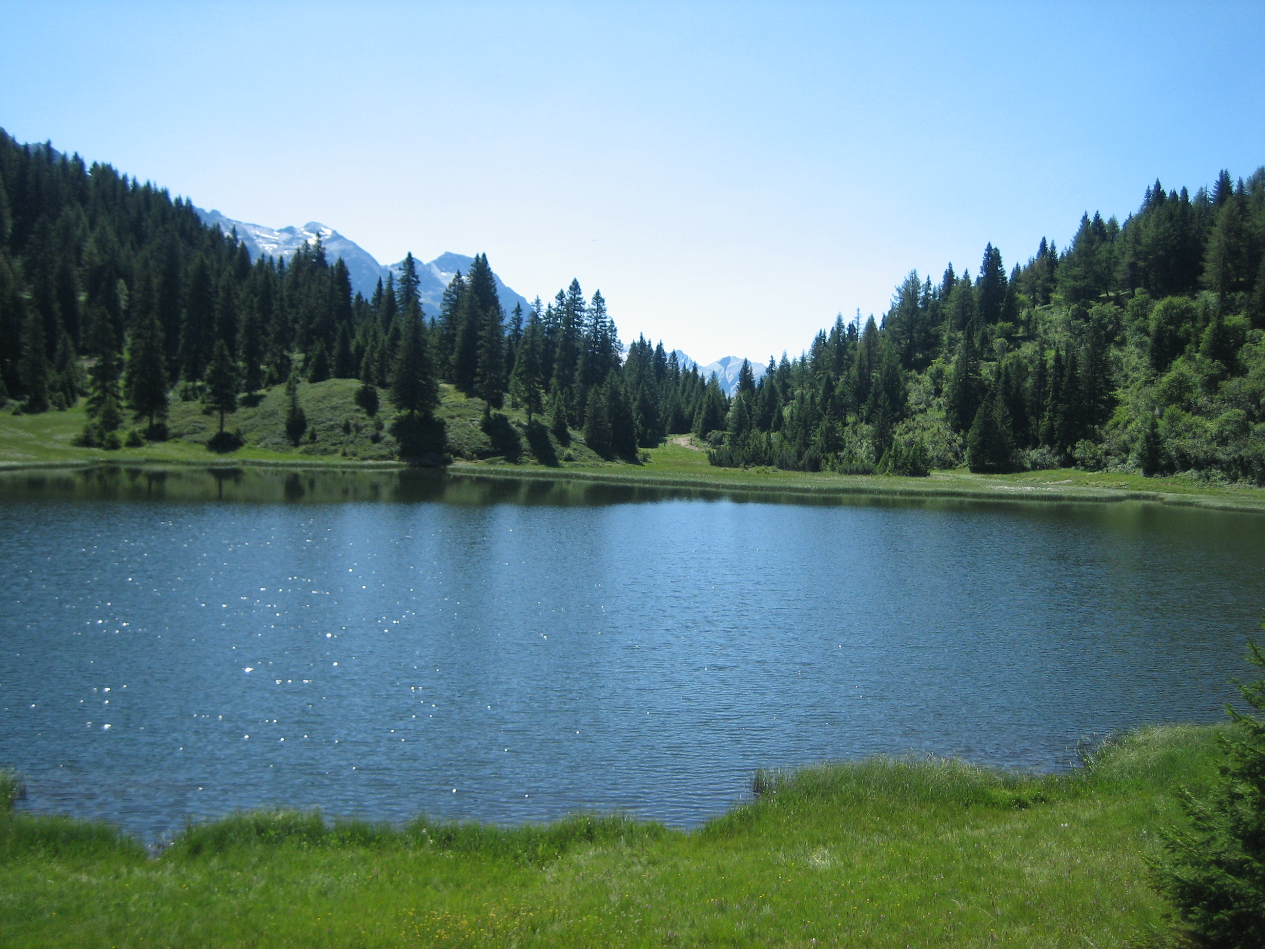 Lago Dosso (Lagh de Pian Doss) südlich von San Bernardino